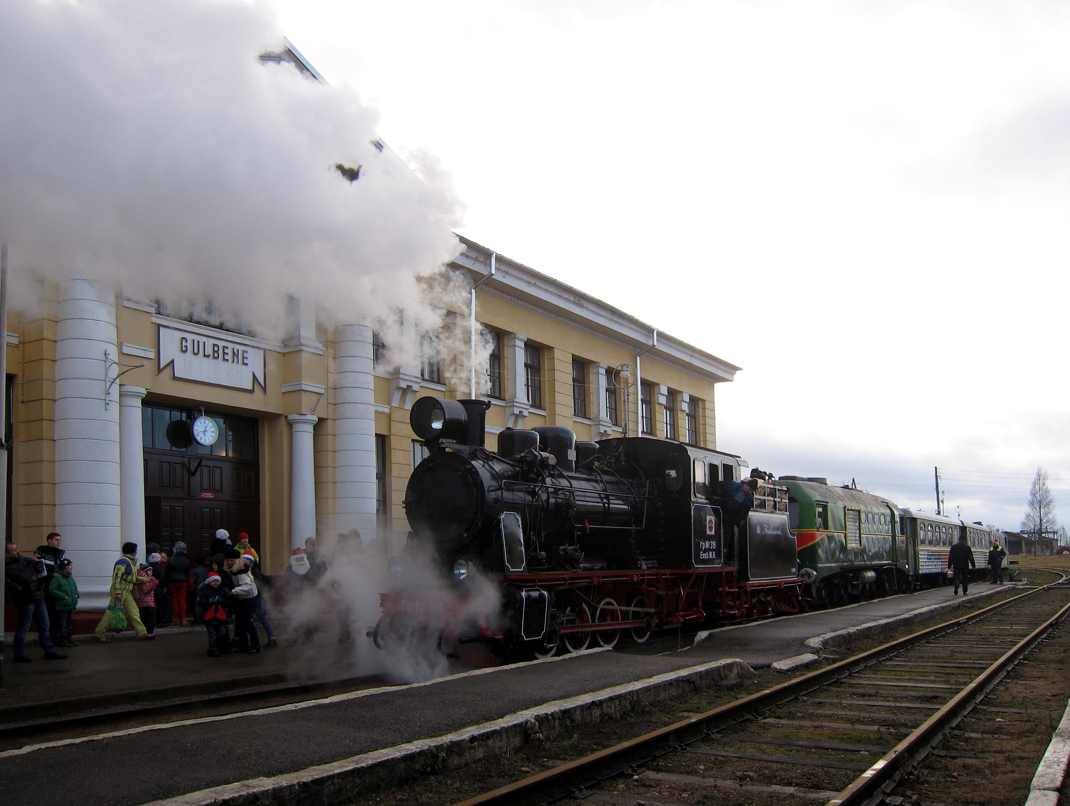 Šaursliežu vilciena sastāvs pie Gulbenes stacijas